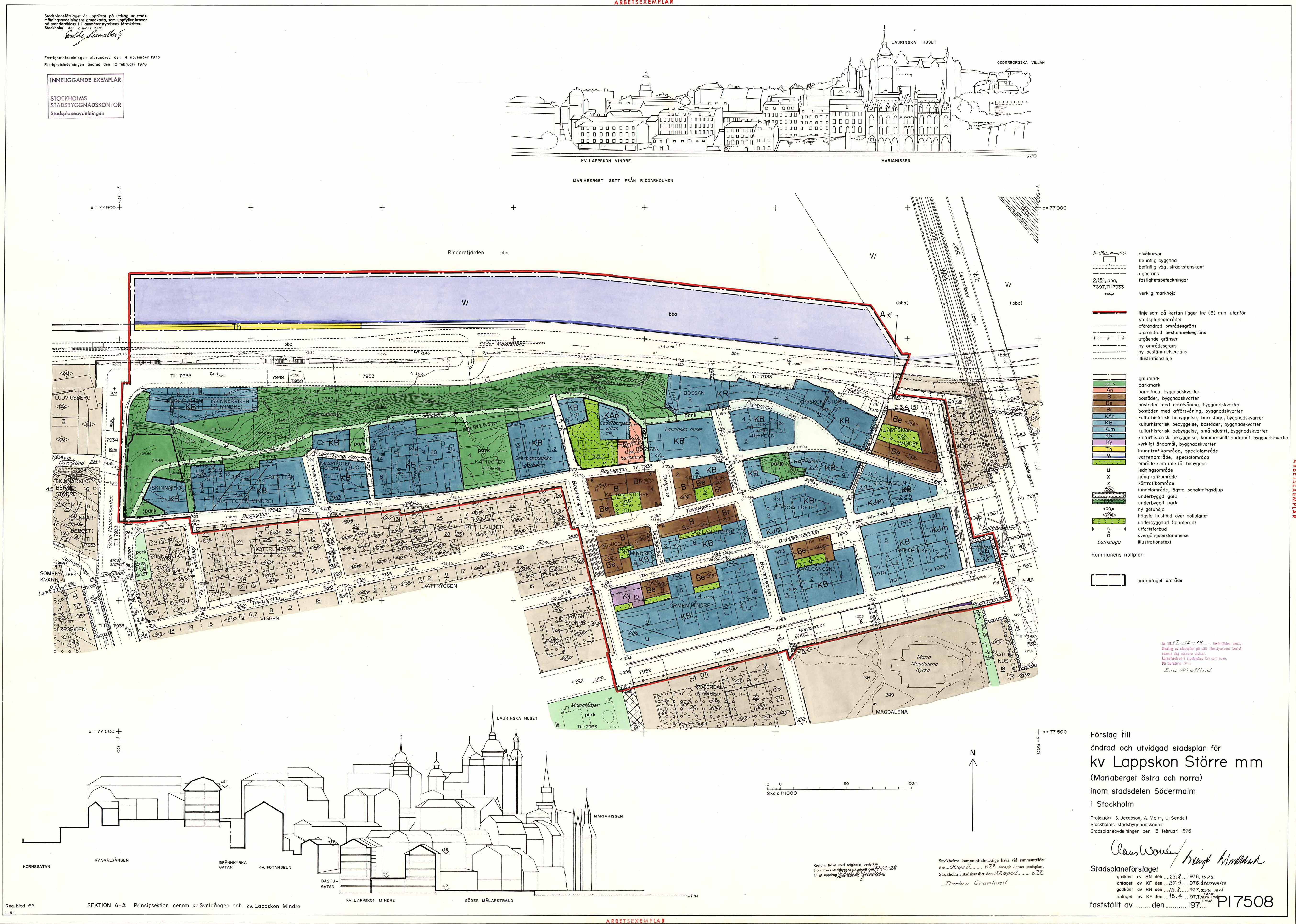 Gällande stadsplan för Mariaberget (Södermalm) laga kraft 19 december 1977